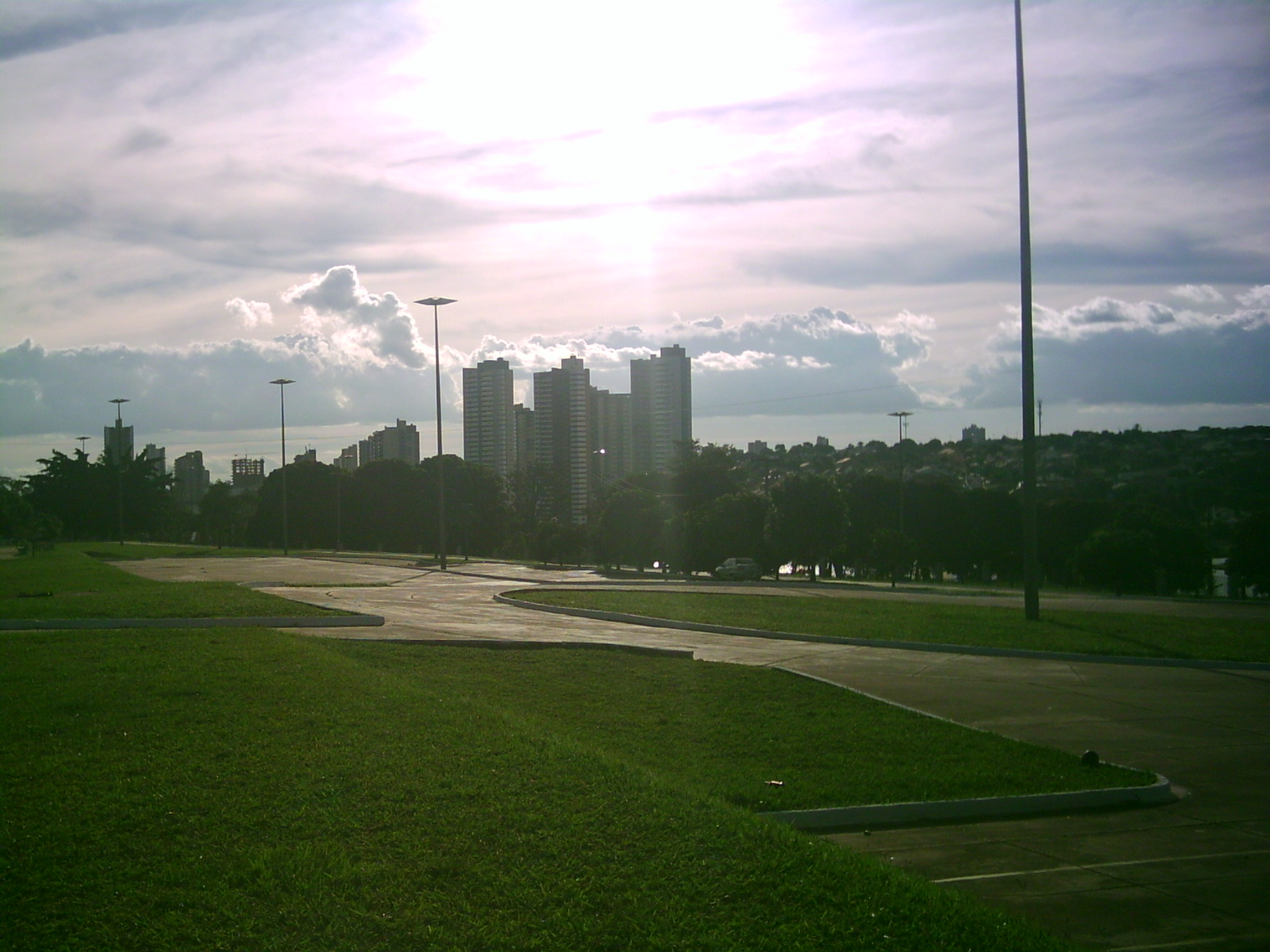 Vista de Campo Grande